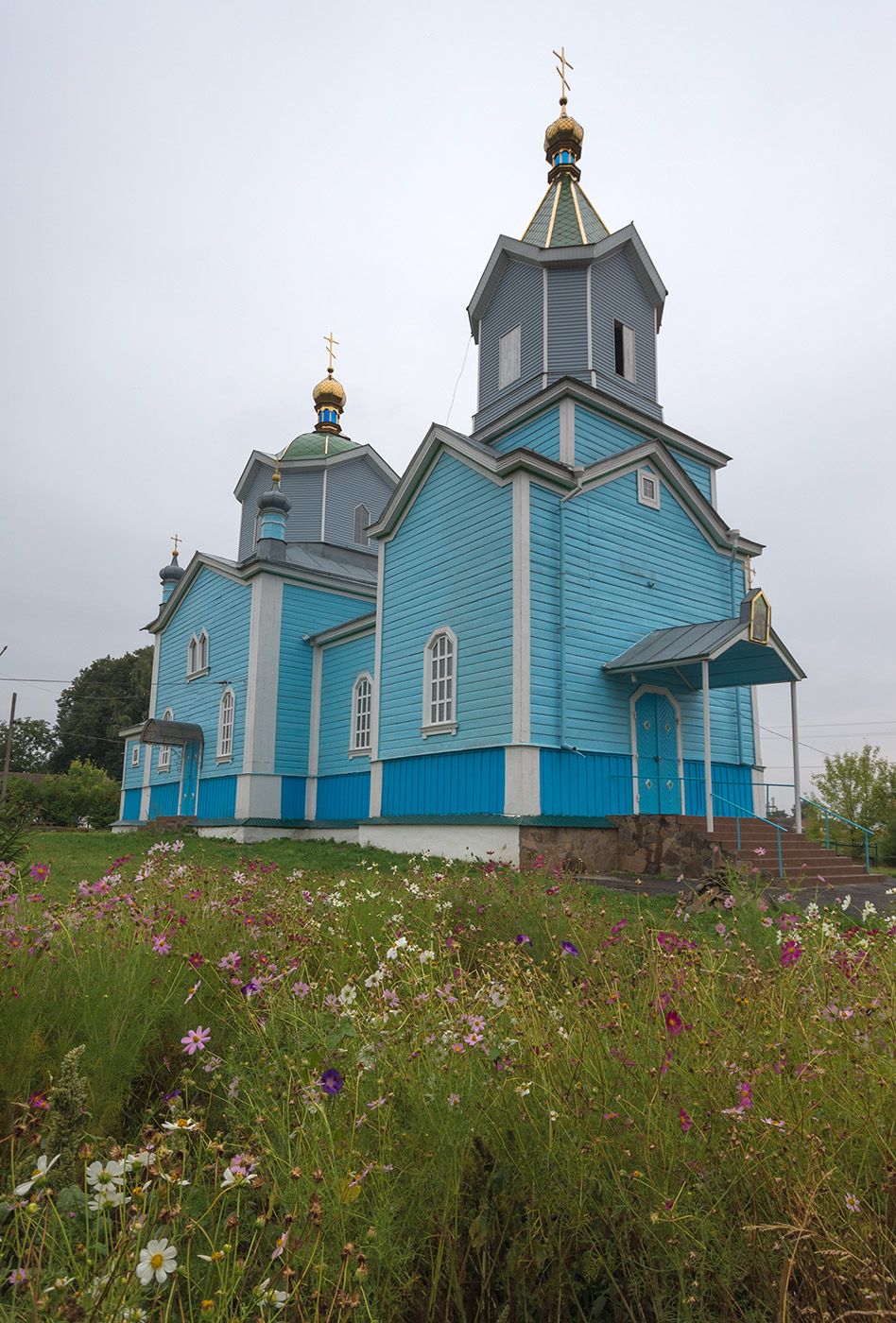 Михайлівська церква, с. Середня Деражня